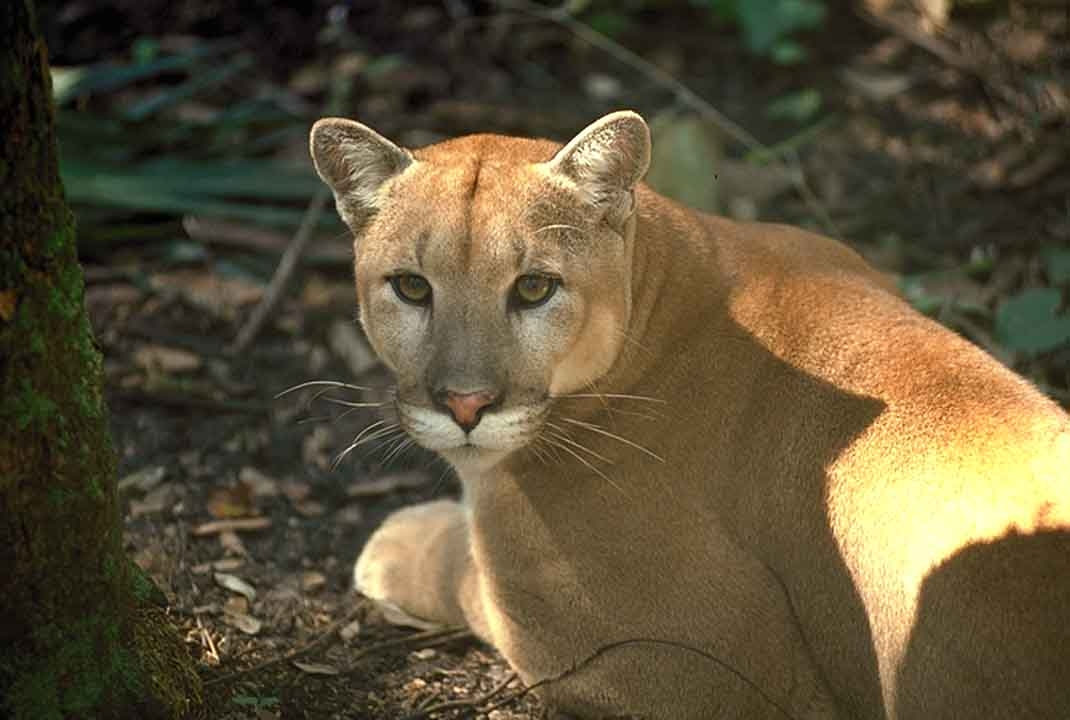 Credit: Connie Bransilver